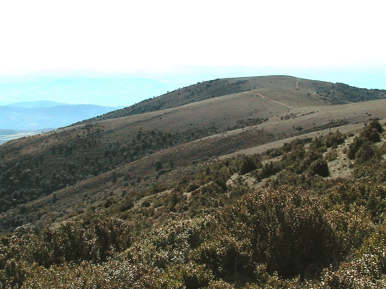 Rasos erosionats al cim de la muntanya de Sant Mamet